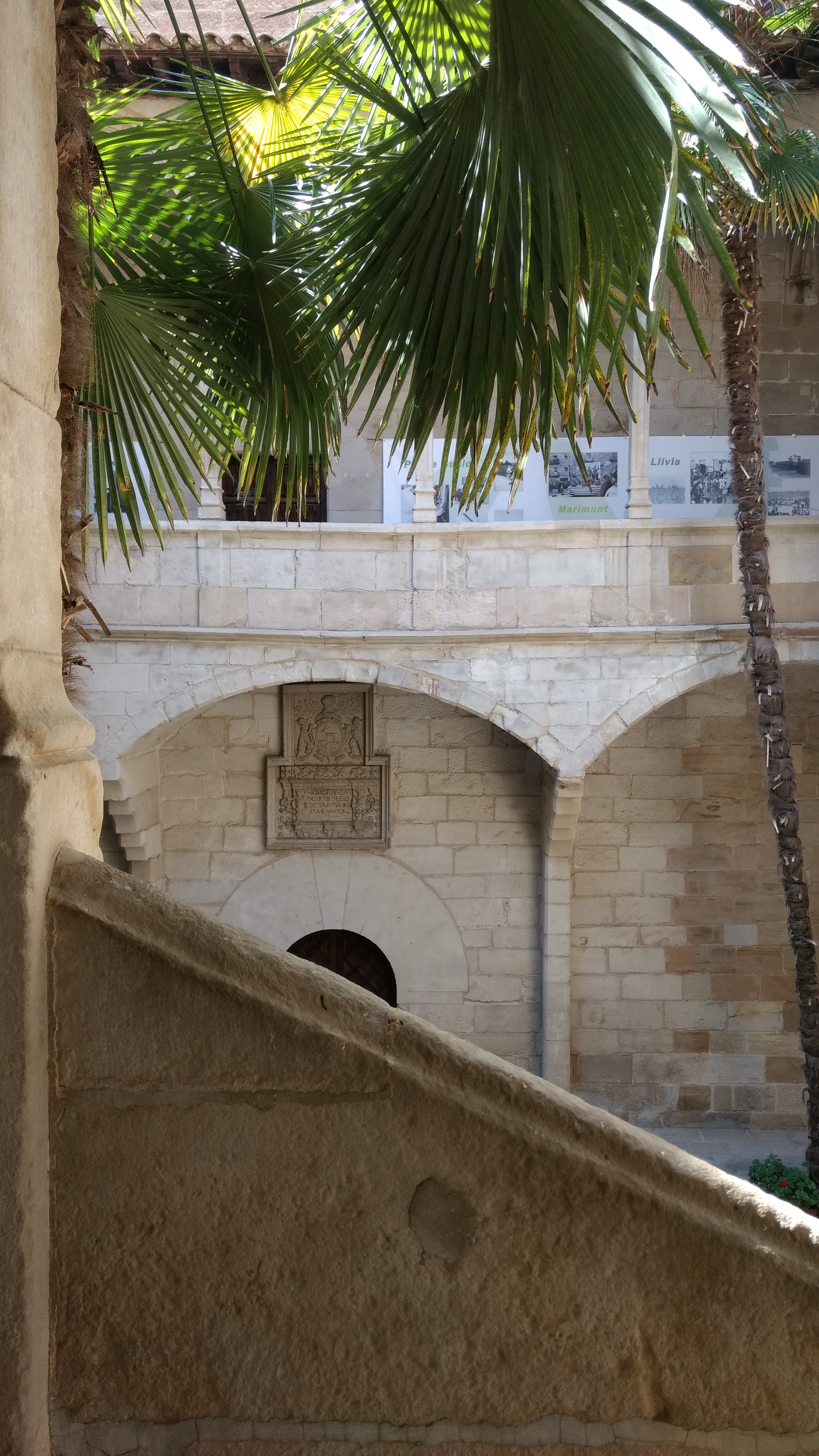 Vista patio interior Hospital de Santa María Lleida